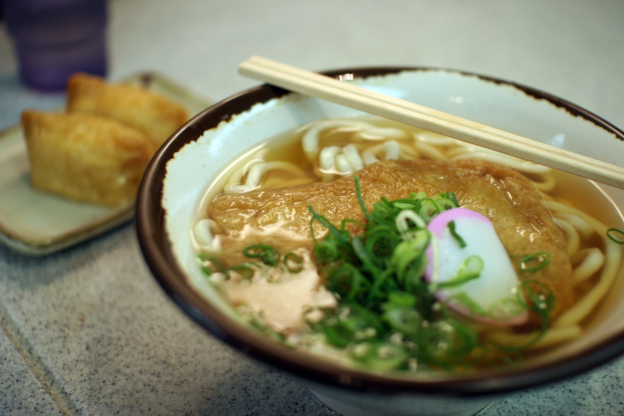 Shin-Osaka Station, Osaka Japan